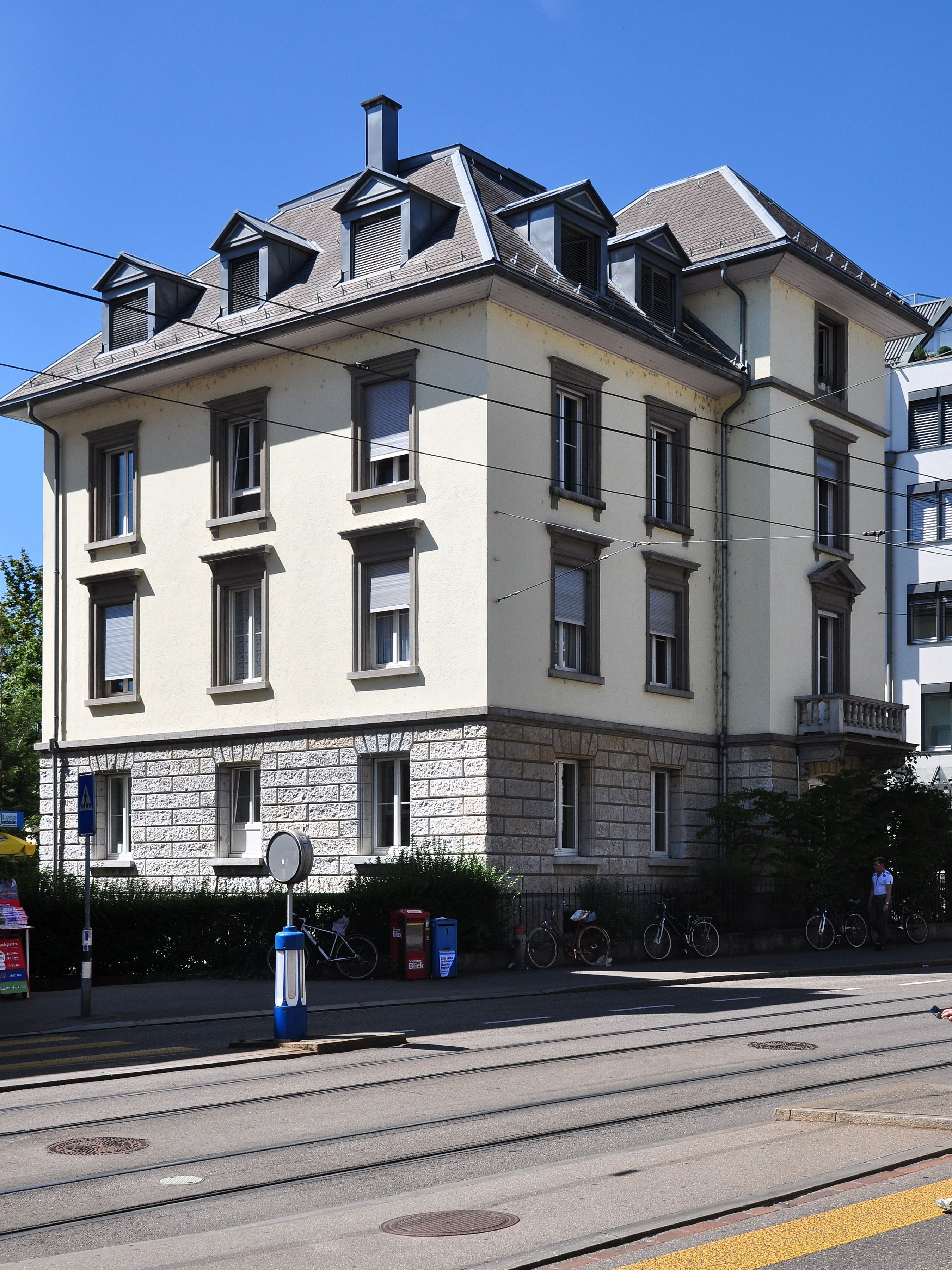 Schweizerische Gemeinnützige Gesellschaft (SSG) in Zürich-Unterstrass (Switzerland)